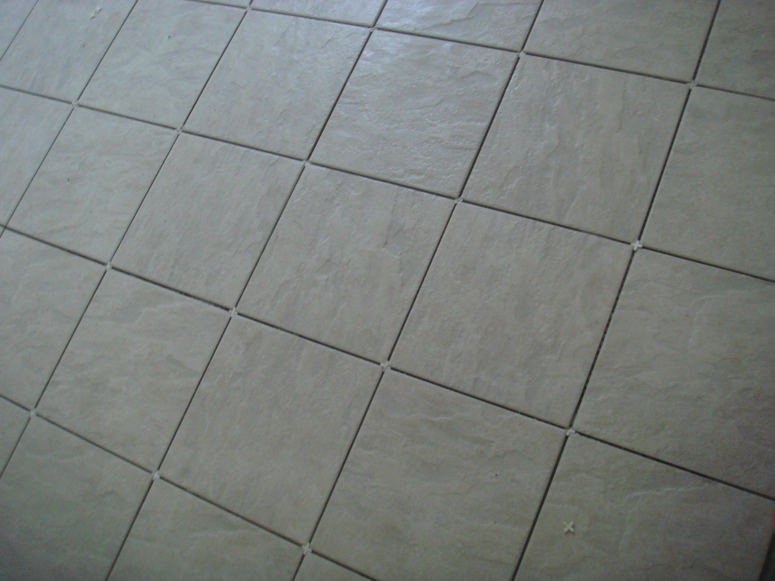 Gres tiles